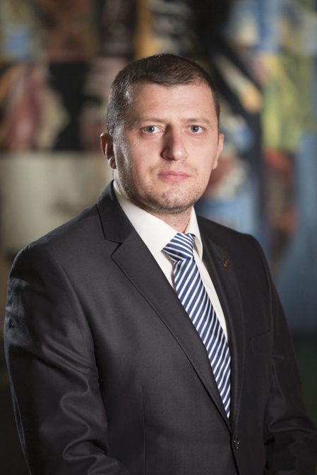 Српски (ћирилица): Др Иван Милић